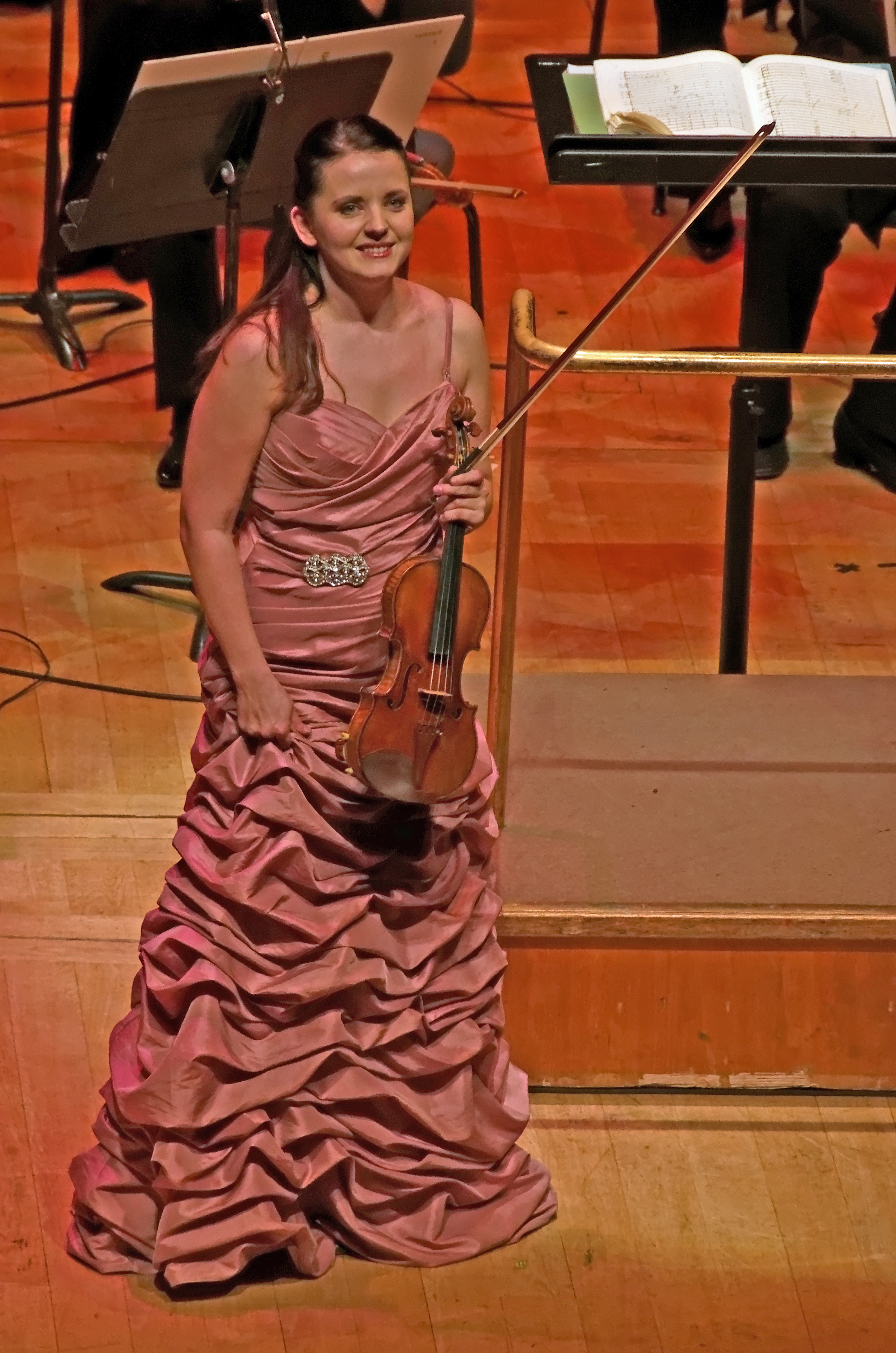 Baiba Skride lors du concert de Nouvel An, sous la direction de Yutaka Sado. Auditorium de Lyon La Part Dieu, France. Baiba Skride jour le Stradivarius « Ex-baron Feilitzsch » (1734)